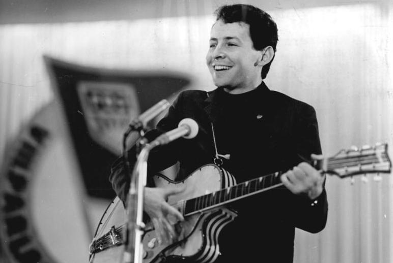 Zentralbild Kohls 4.4.1967 Vorbereitung zum VII. Parteitag der SED Berlin: Lyrikabend in der Berliner Kongreßhalle Jürgen Pippig vom "Oktoberklub" trug das Lied "Wir sind jung", das er zum Treffen der Jugend der DDR in Karl-Marx-Stadt geschrieben hat, vor. Die besten von etwa 500 in den vergangen drei Jahren eingereichten Gedichte eines Schülerwettbewerbes sind am Montagabend auf einer festlichen Veranstaltung zu Ehren des VII.Parteitag der SED vorgetragen worden. 1000 junge Teilnehmer nahmen die dargebotenen Beiträge begeistert auf. Mit viel Spaß wurden gemeinsam mit Mitgliedern des "Oktoberklubs" und des "Temms 4" alte und neue Lieder gesungen.